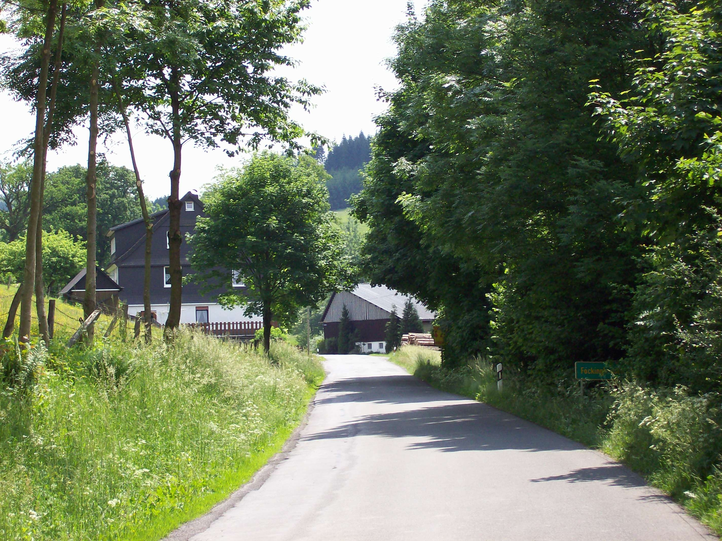 Ortseingang (K 38) Föckinghausen in Schmallenberg (Germany)